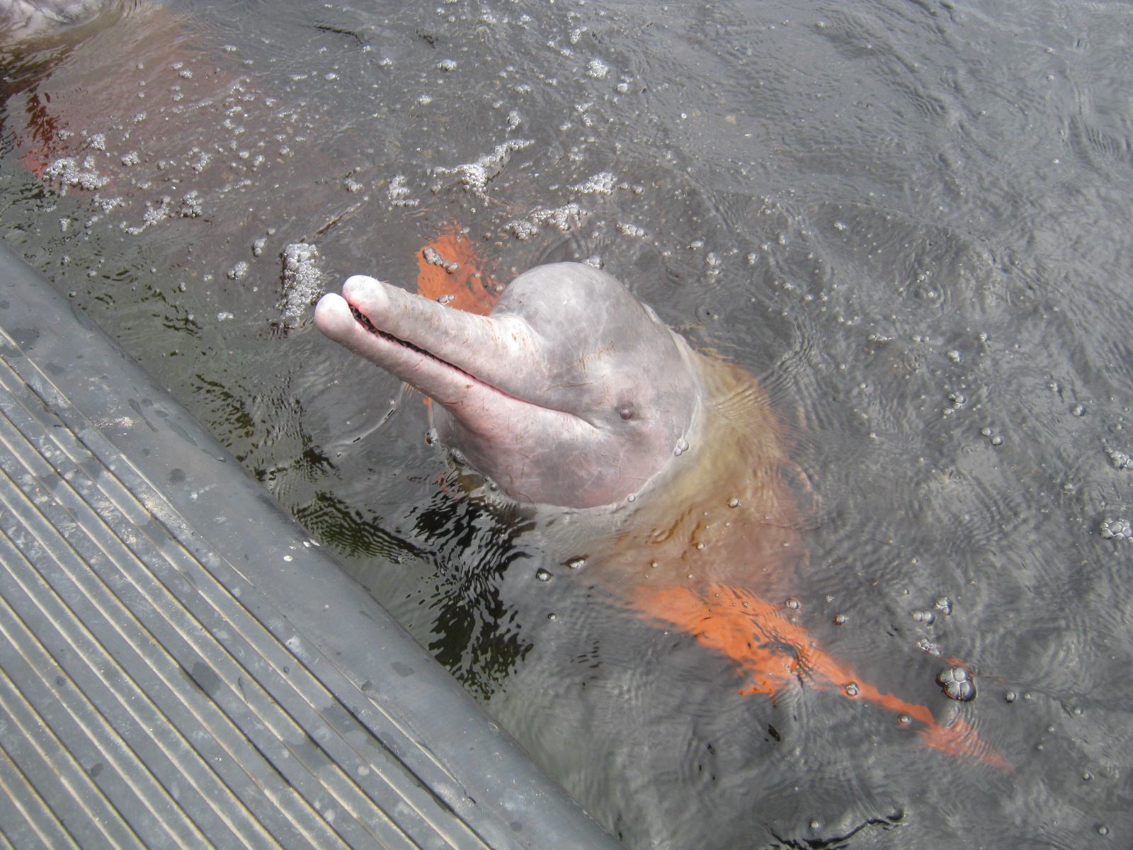 דולפין נהרות אמזוני